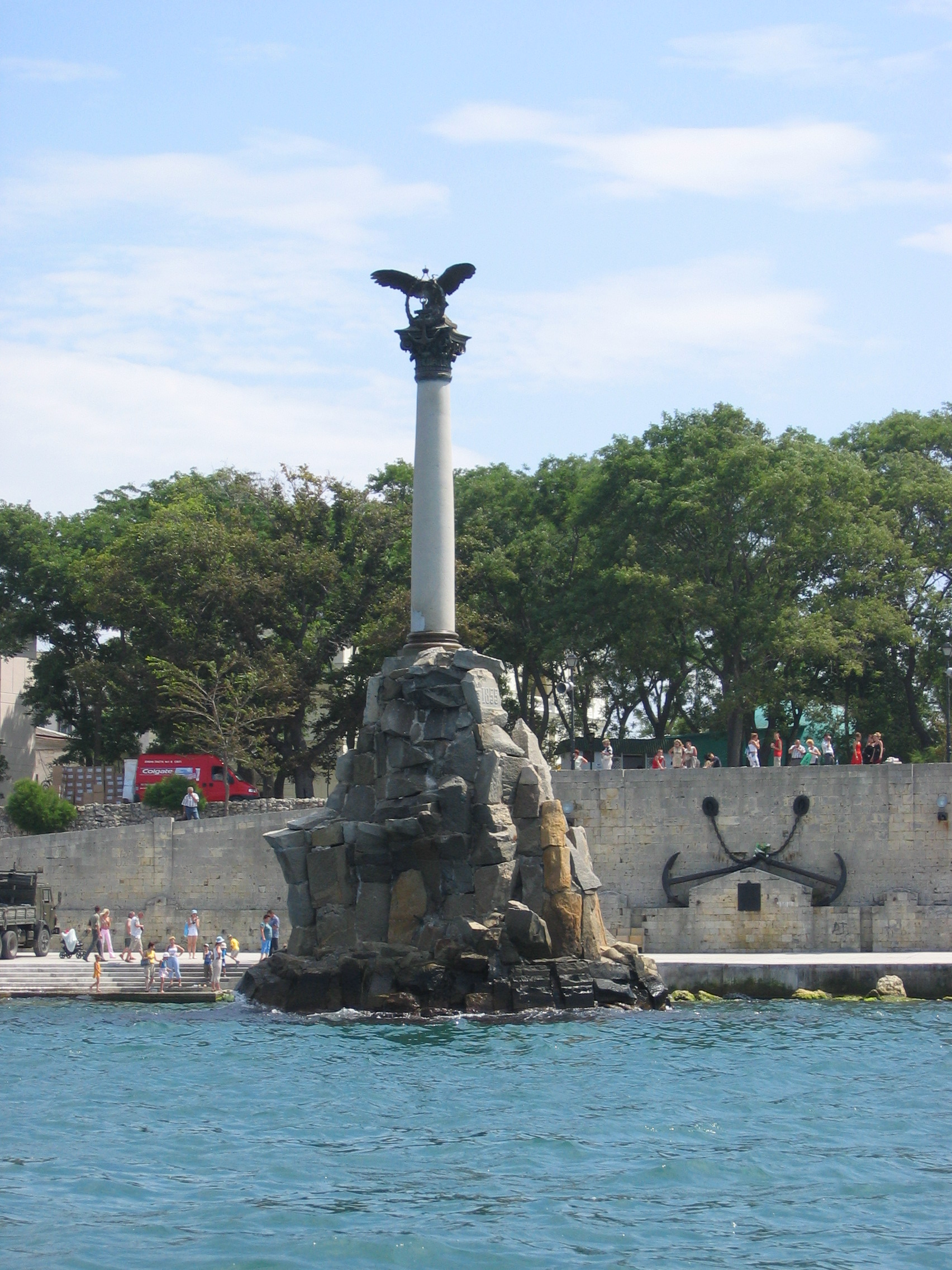 Monumento a los Barcos Hundidos